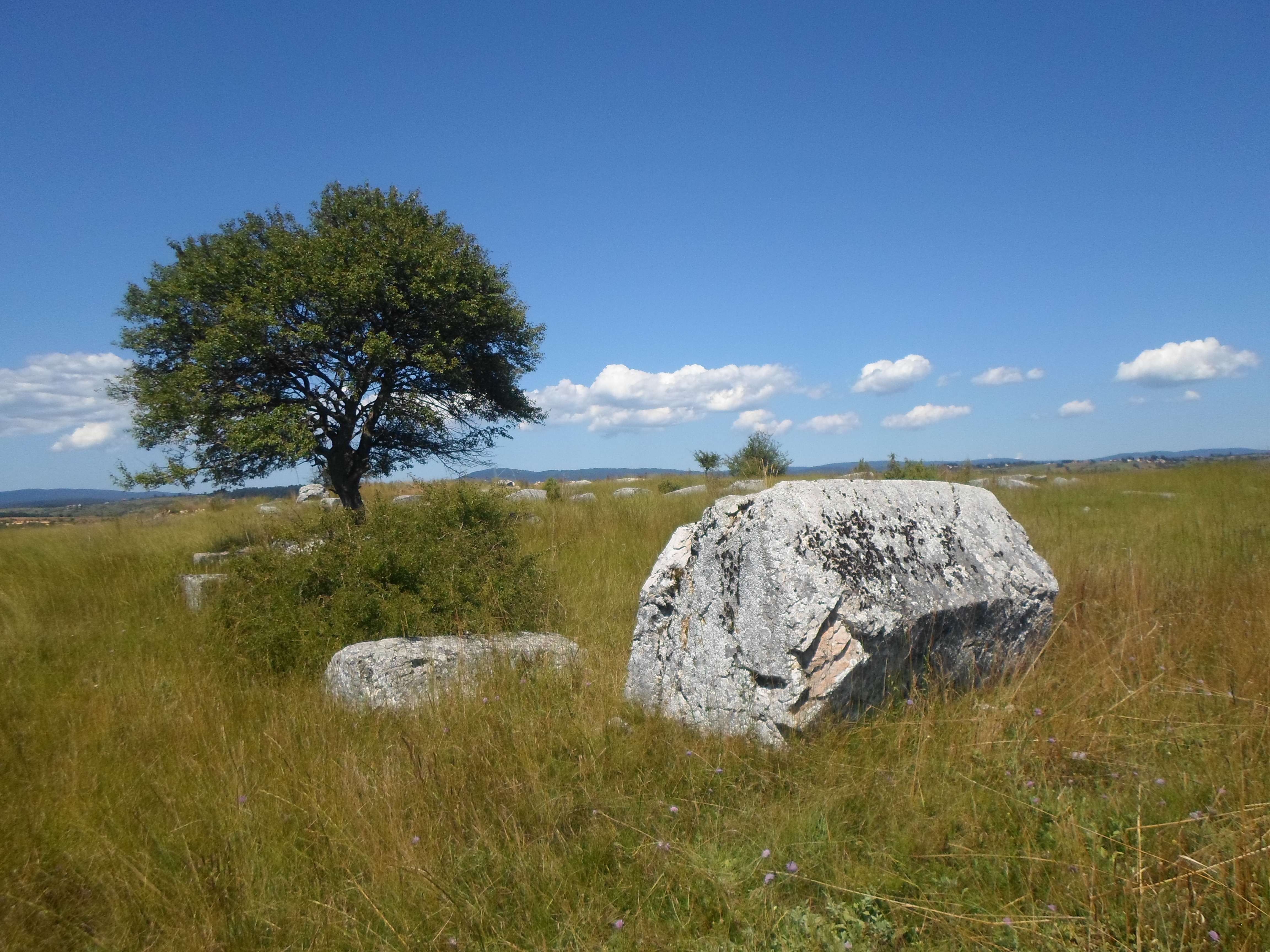 Праисторијски тумулуси и некрополе са стећцима, Лубурића поље This image was uploaded as part of Trace of Soul 2016.